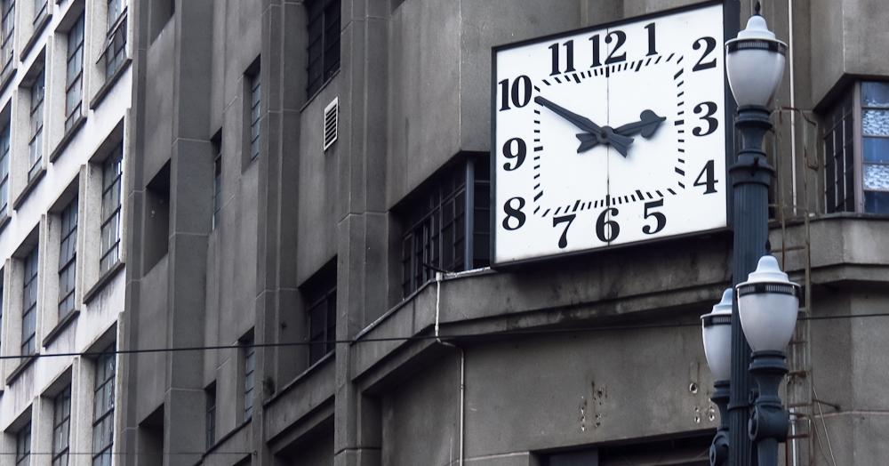 O tradicional relogio no predio do saudoso Mappin,a primeira grande loja do Brasil na Pça . Ramos.